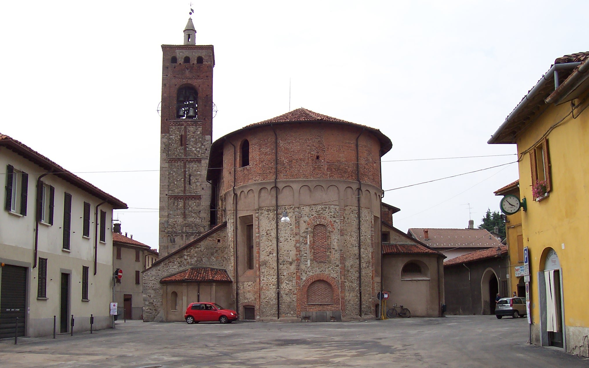 Piazza Castellana con la Collegiata di Santo Stefano.